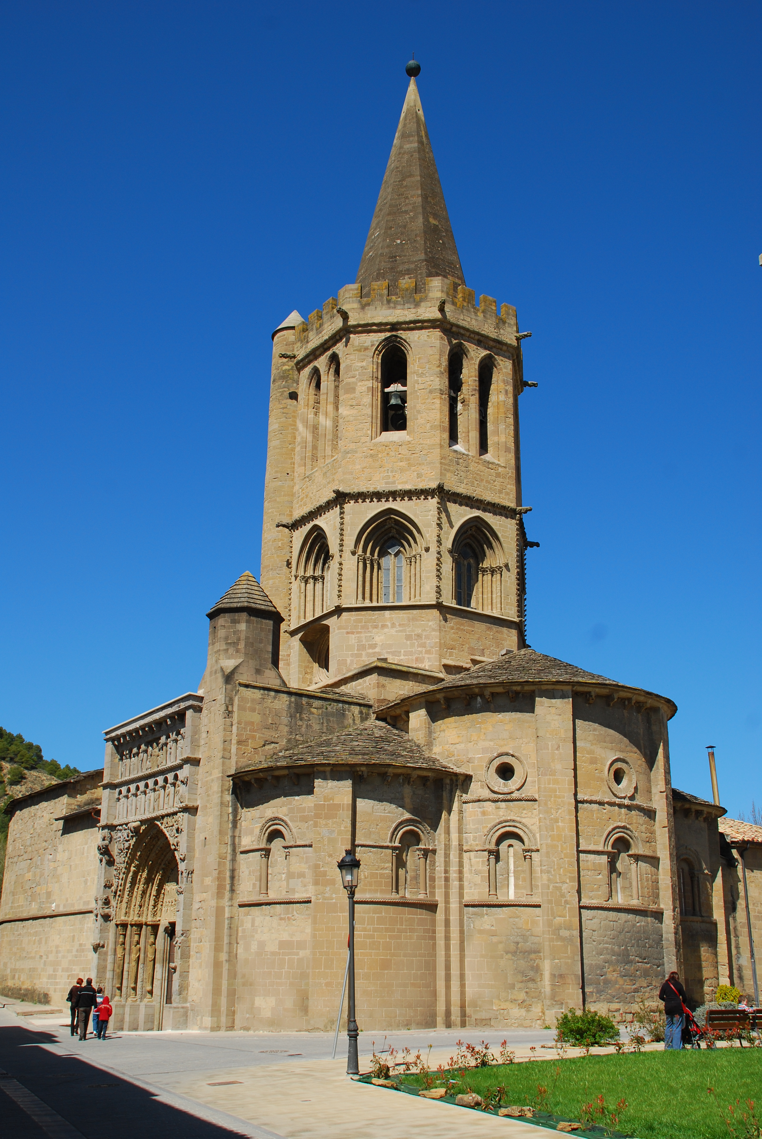 Iglesia románica de Santa Maria la Real de Sangüesa.